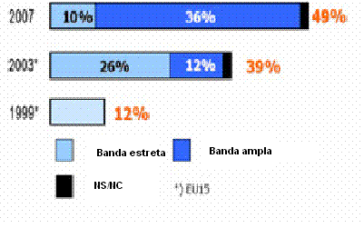 evolucio banda ampla